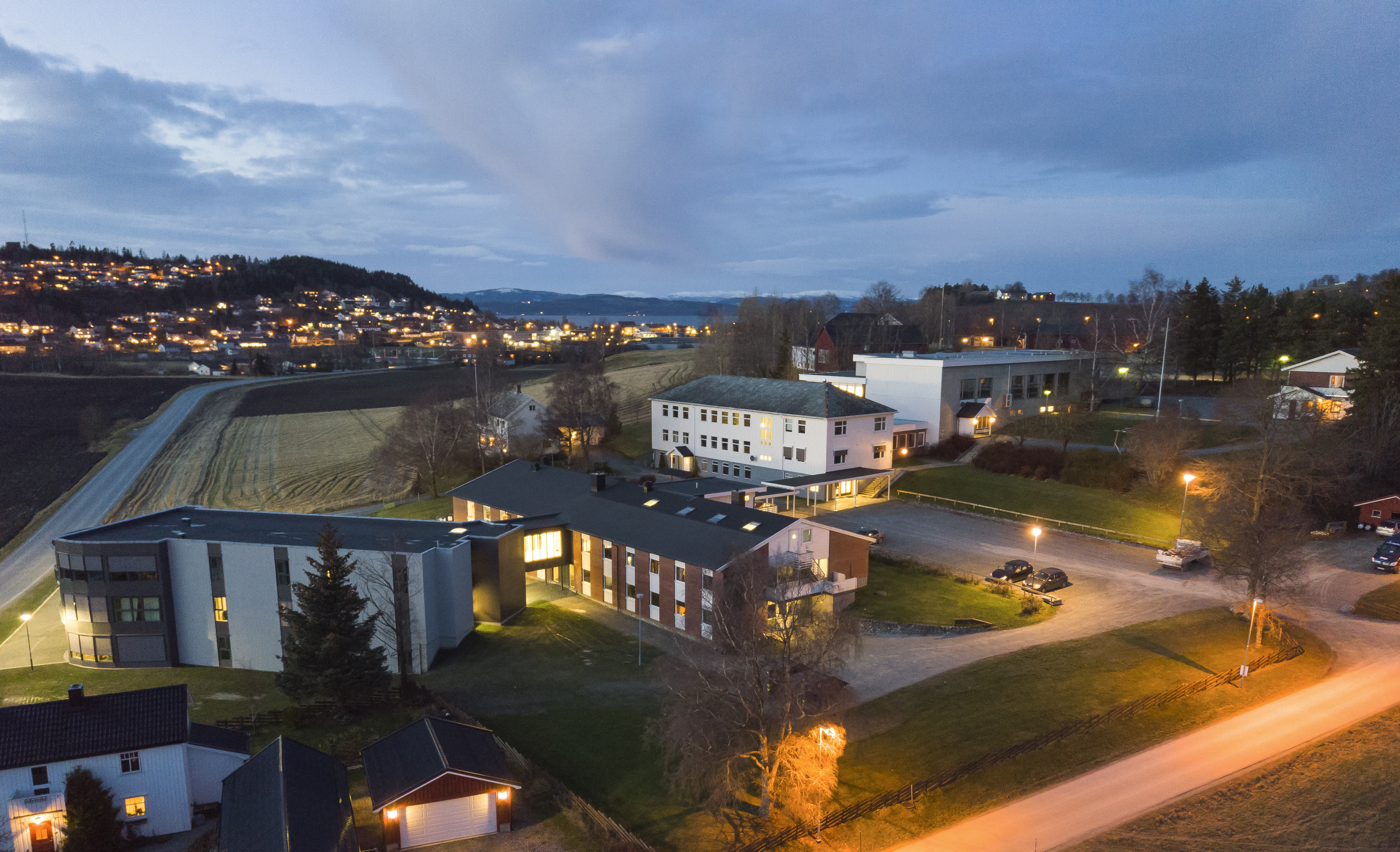 Internater og undervisningsbygg